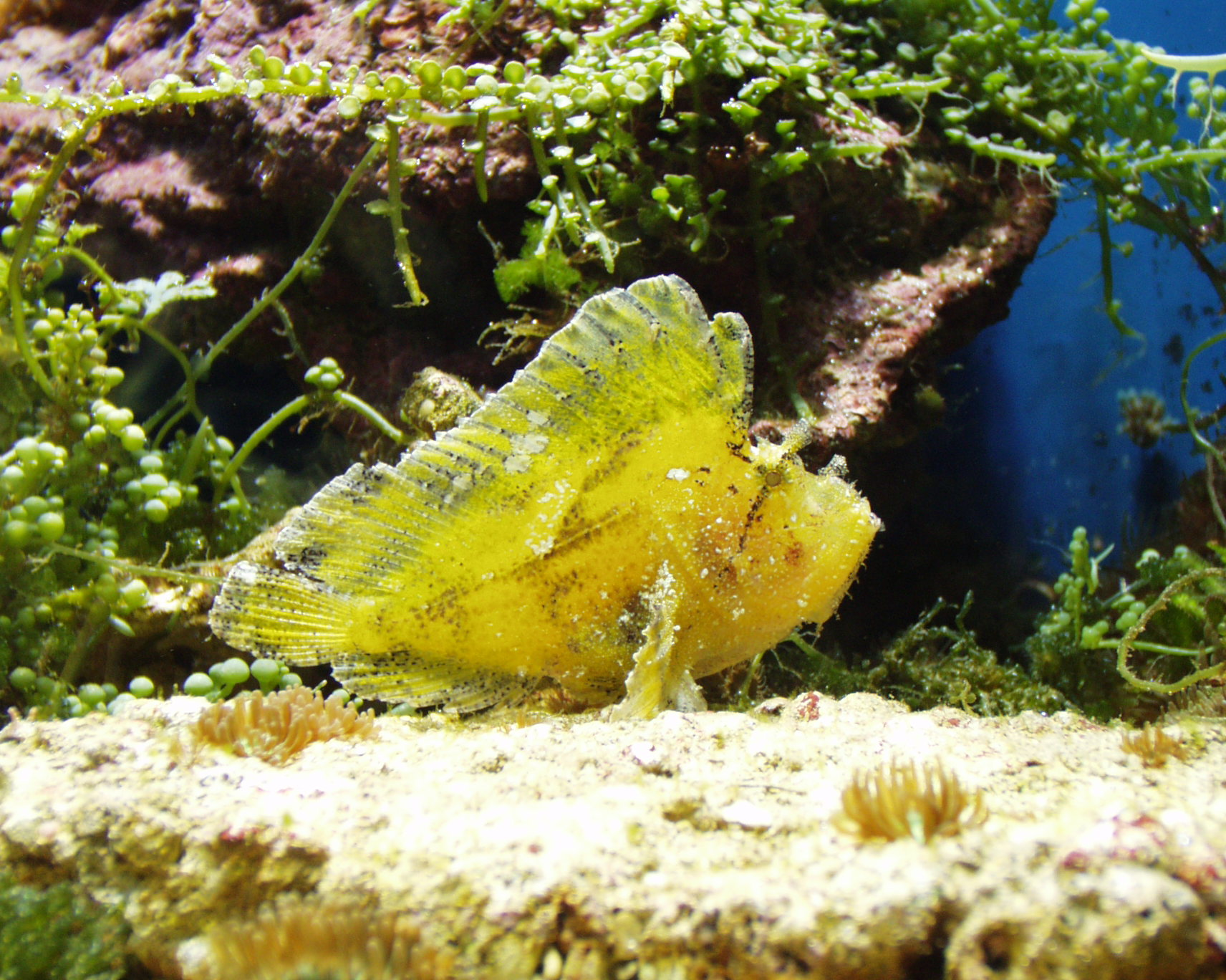 Taenianotus triacanthus (Schaukelfisch)